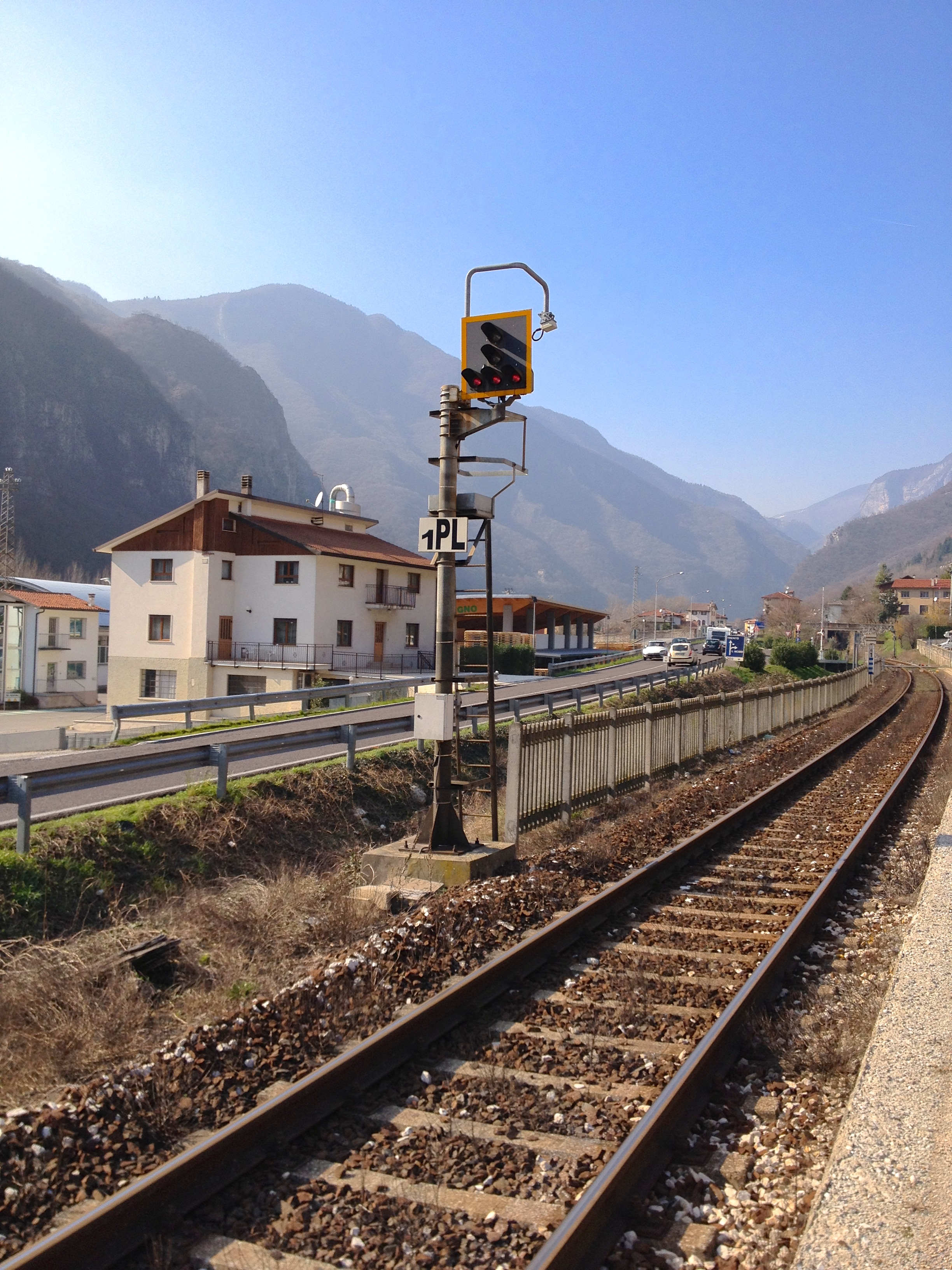 Transponder SSC protezione passaggio a livello, fermata di Solagna